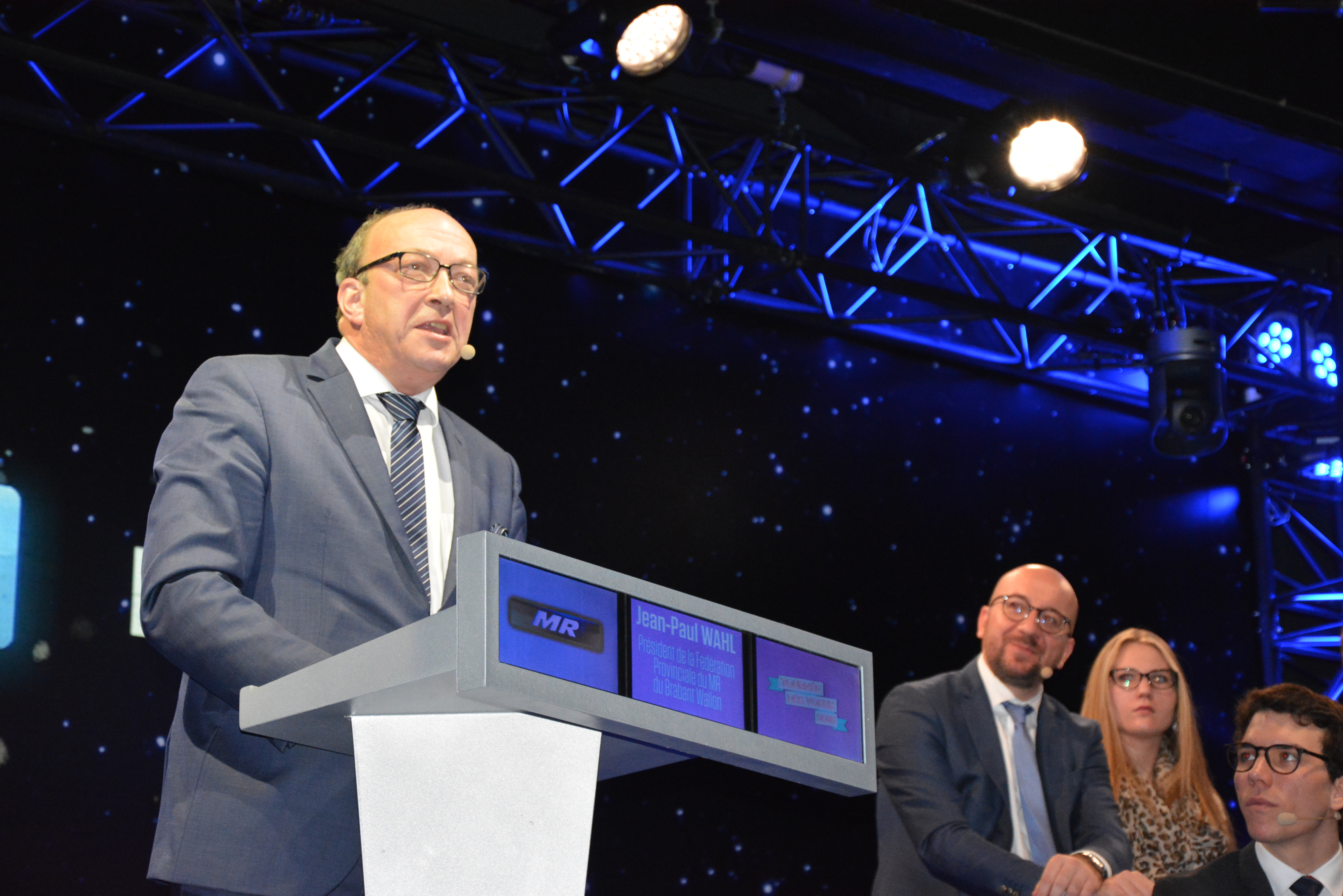 Jean-Paul Wahl lors de la cérémonie des voeux 2016 au MR Brabant wallon.